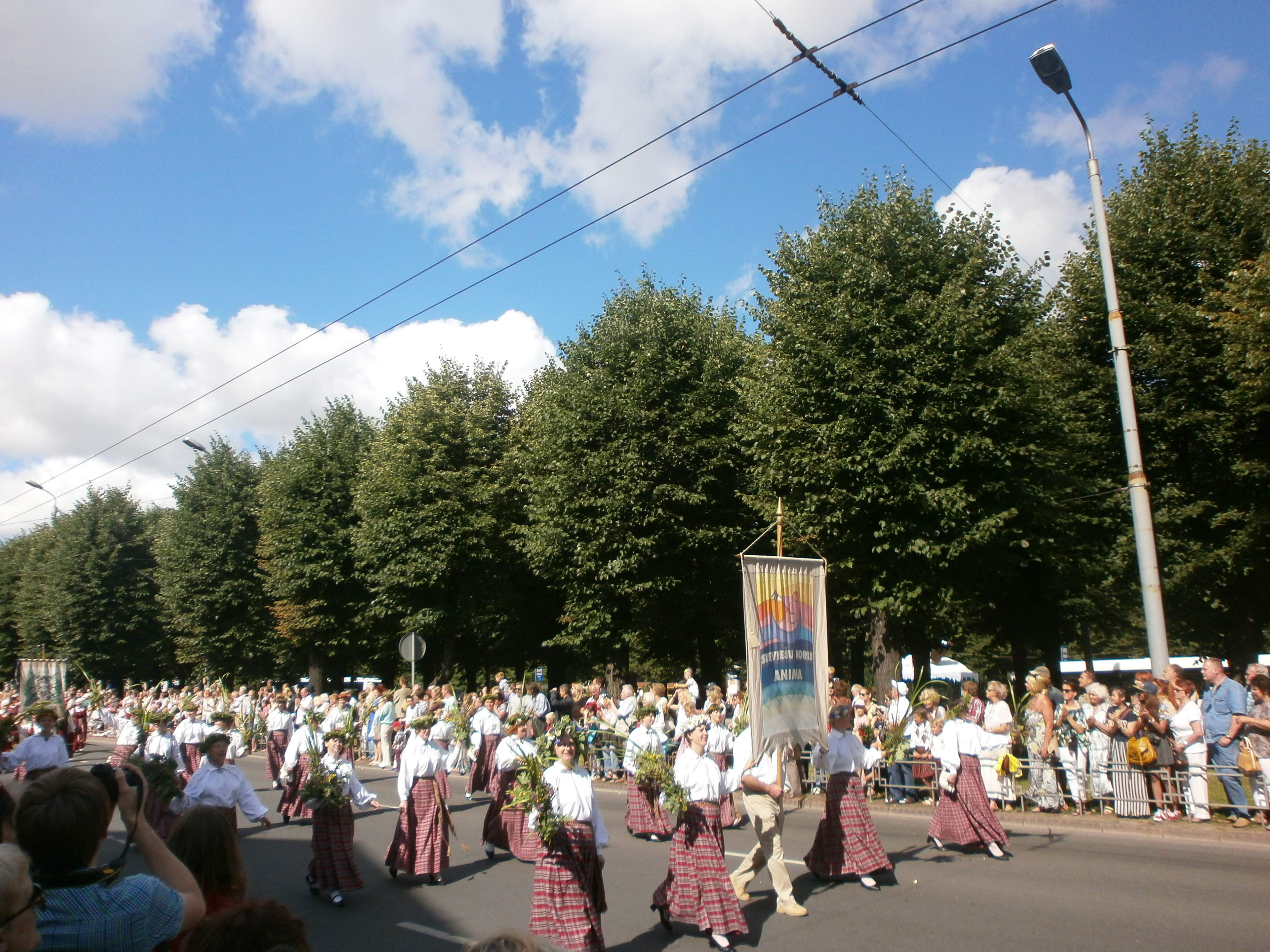 Dziesmu un deju svētku gājiens 2013. gadā